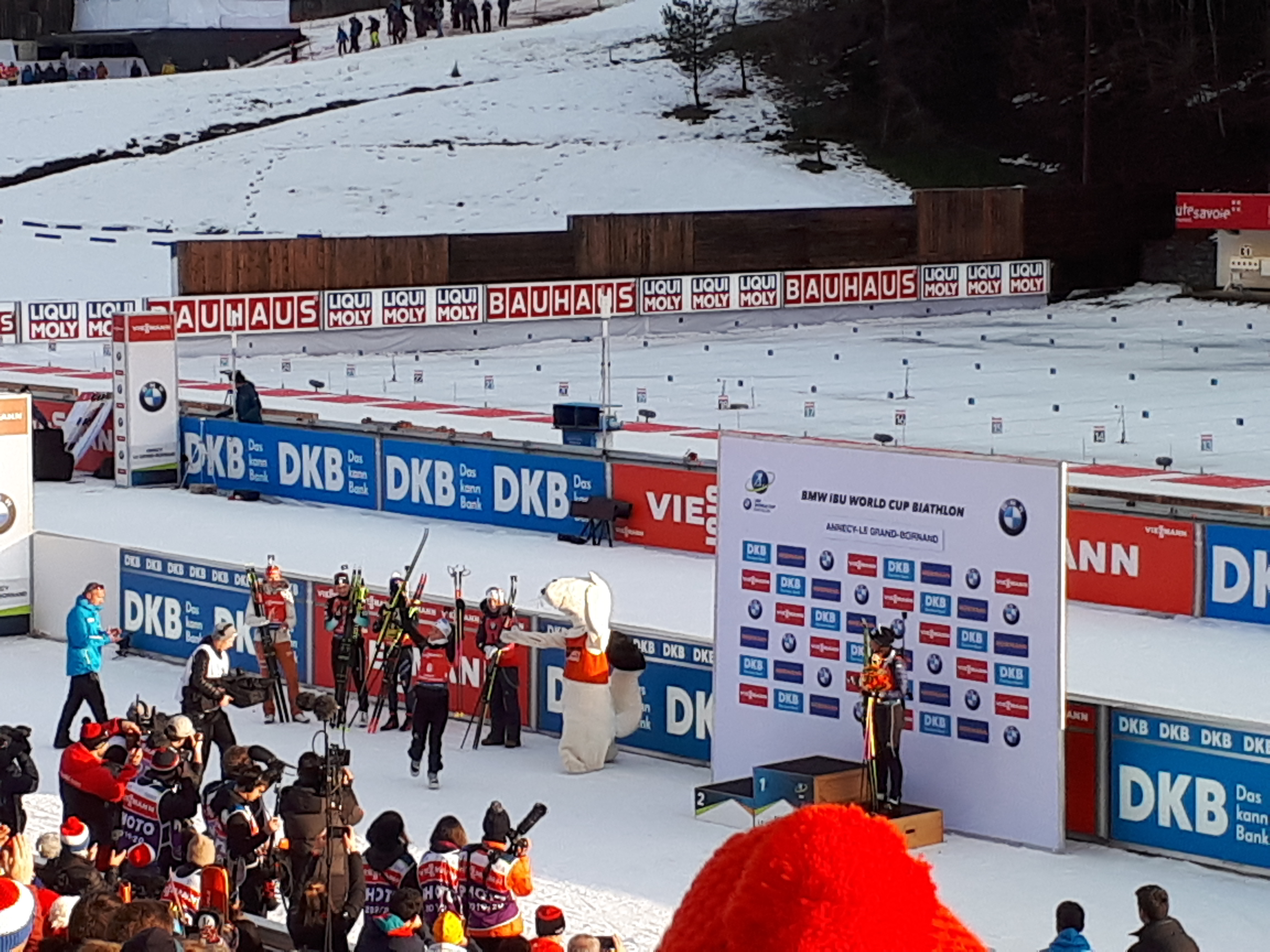 Coupe du monde de biathlon en décembre 2019 au Grand Bornand. La cérémonie de remise des récompenses de la poursuite femmes.